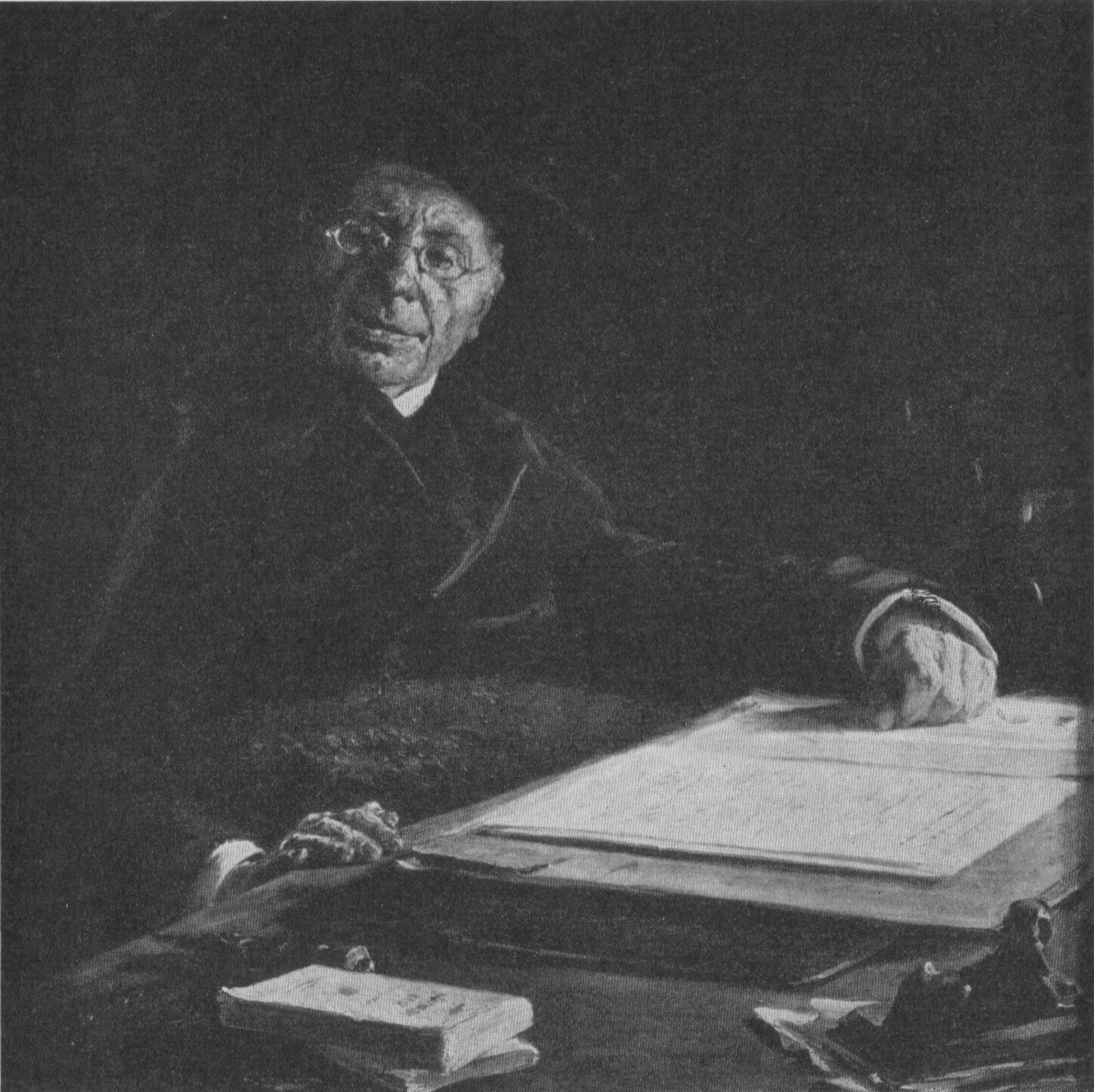 Jonas Lie malt av P.S. Krøyer (1902).